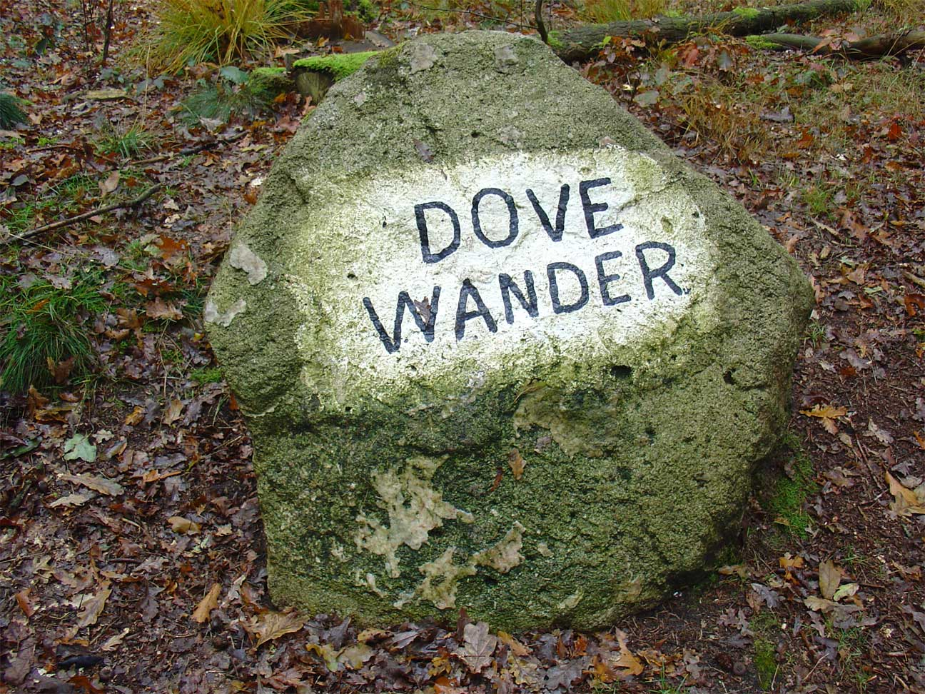 "Dove Wander" grenssteen tussen de dorpen Amen, Hooghalen, Zwiggelte en Grolloo